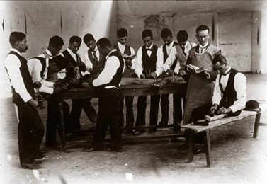 Clase de anatomía de la escuela de Medicina en 1896, Universidad de Antioquia, Medellín, Colombia.